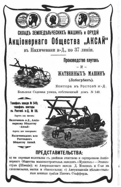 Склад Акционерного общества "Аксай"